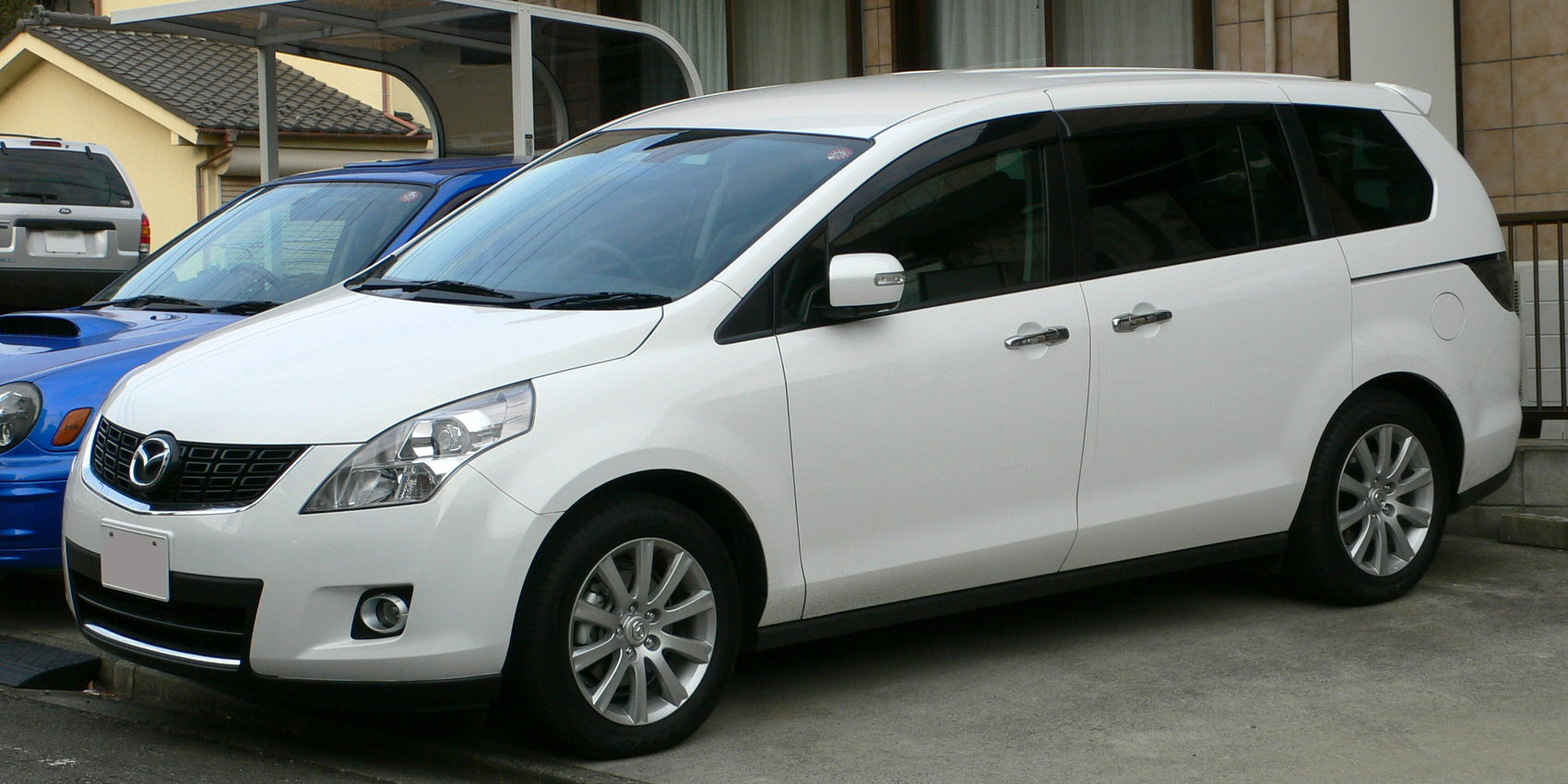 3rd generation Mazda MPV (2006 -)